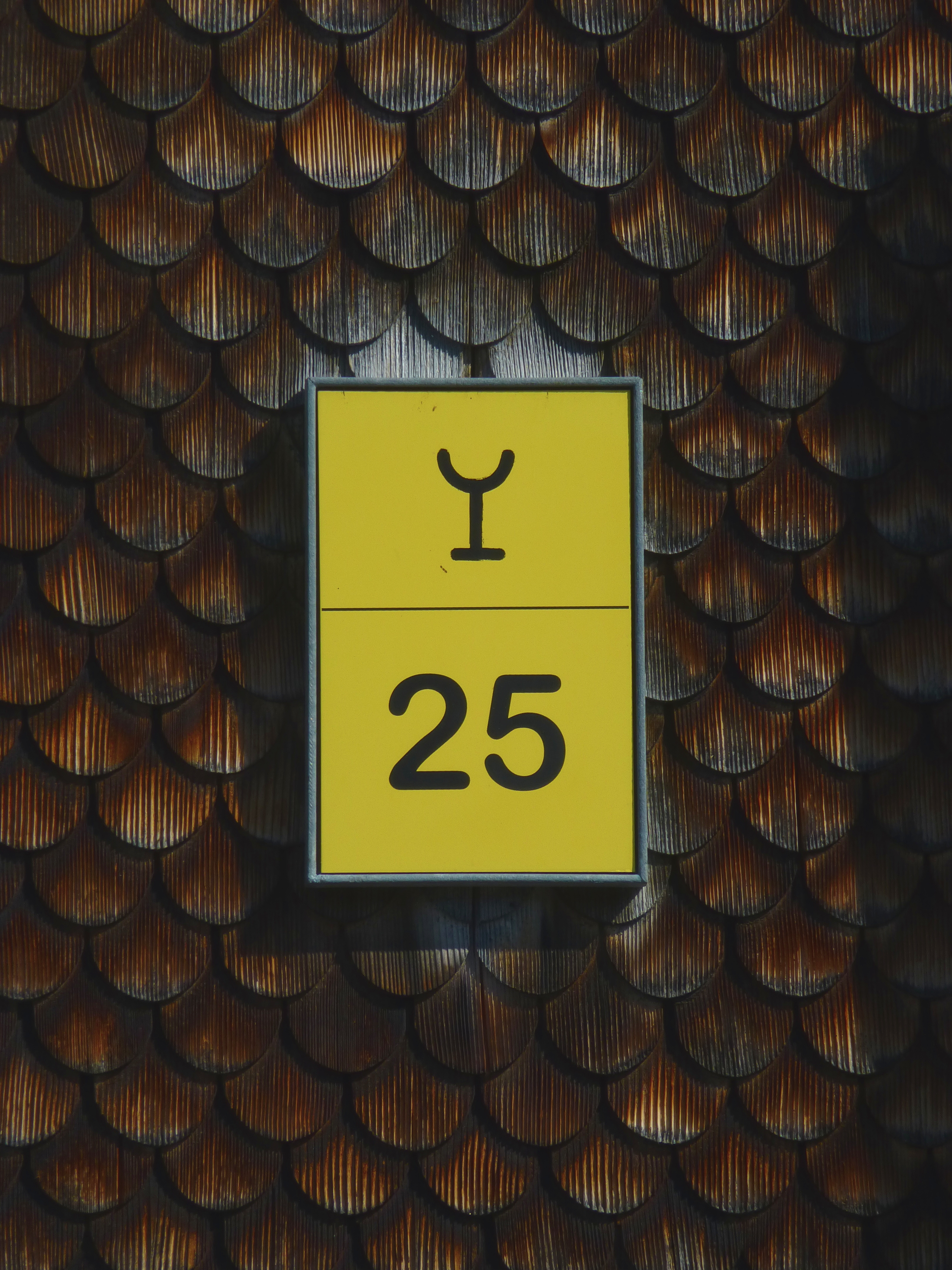 eines der Hauszeichen, die im Rahmen des Projekts Gisalz 98 an jedem Haus in der österreichischen Gemeinde Übersaxen angebracht wurde, hier am denkmalgeschützten Pfarrhof.